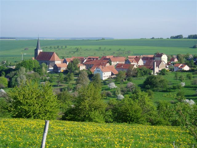 Loutzviller (France)